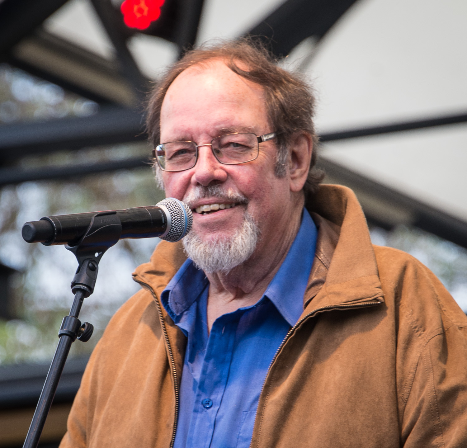 Stefan Demert på Stockholms Visfestival 2015.